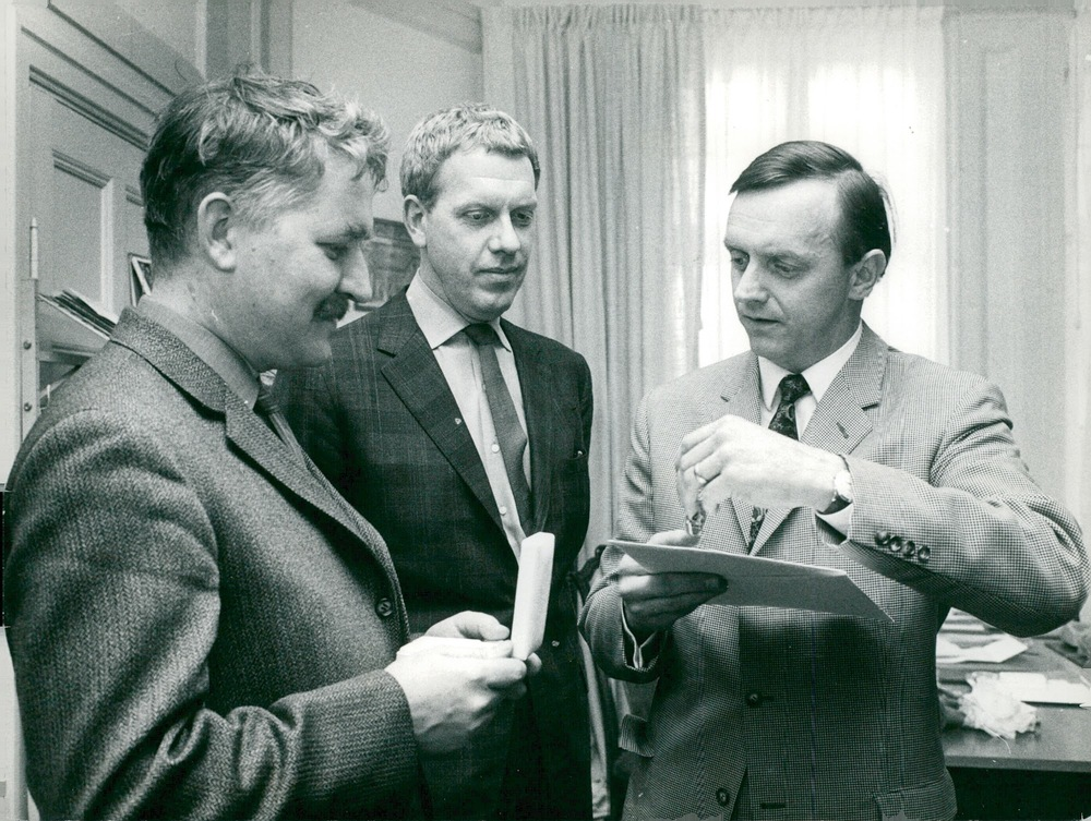 Bildtext i Svenska Dagbladet 1968-04-26: "Tre mycket informella herrar möttes på Svenska Teaterförbundet på torsdagen: Tearterförbundets ordförande, skådespelaren Jan Olof Strandberg, överlämnade Karl Gerhards hederspris – medalj, diplom och 2,000 kr. – till Hasse Alfredson och Tage Danielsson."